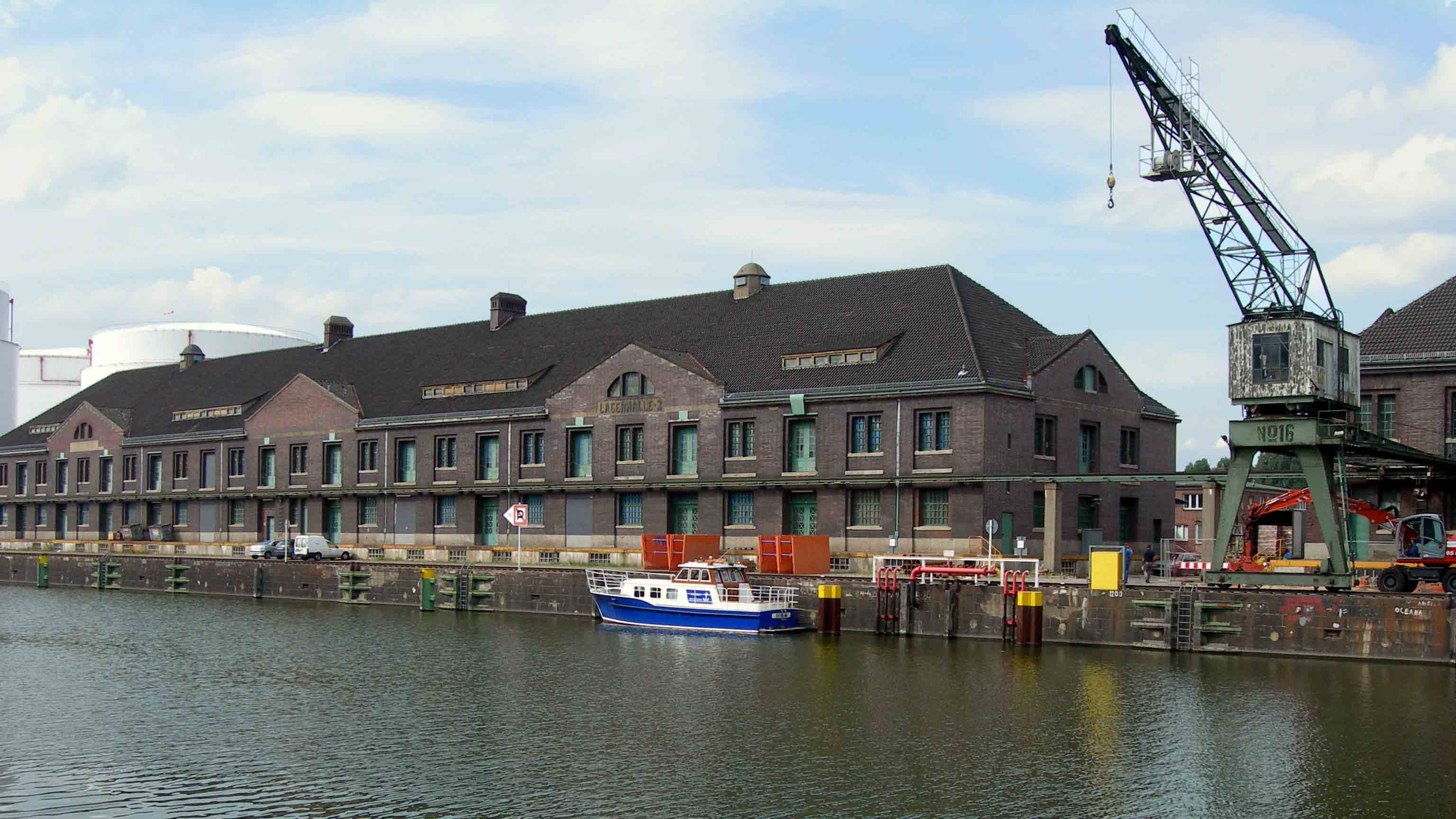 Westhafen (Berlin) storehouse